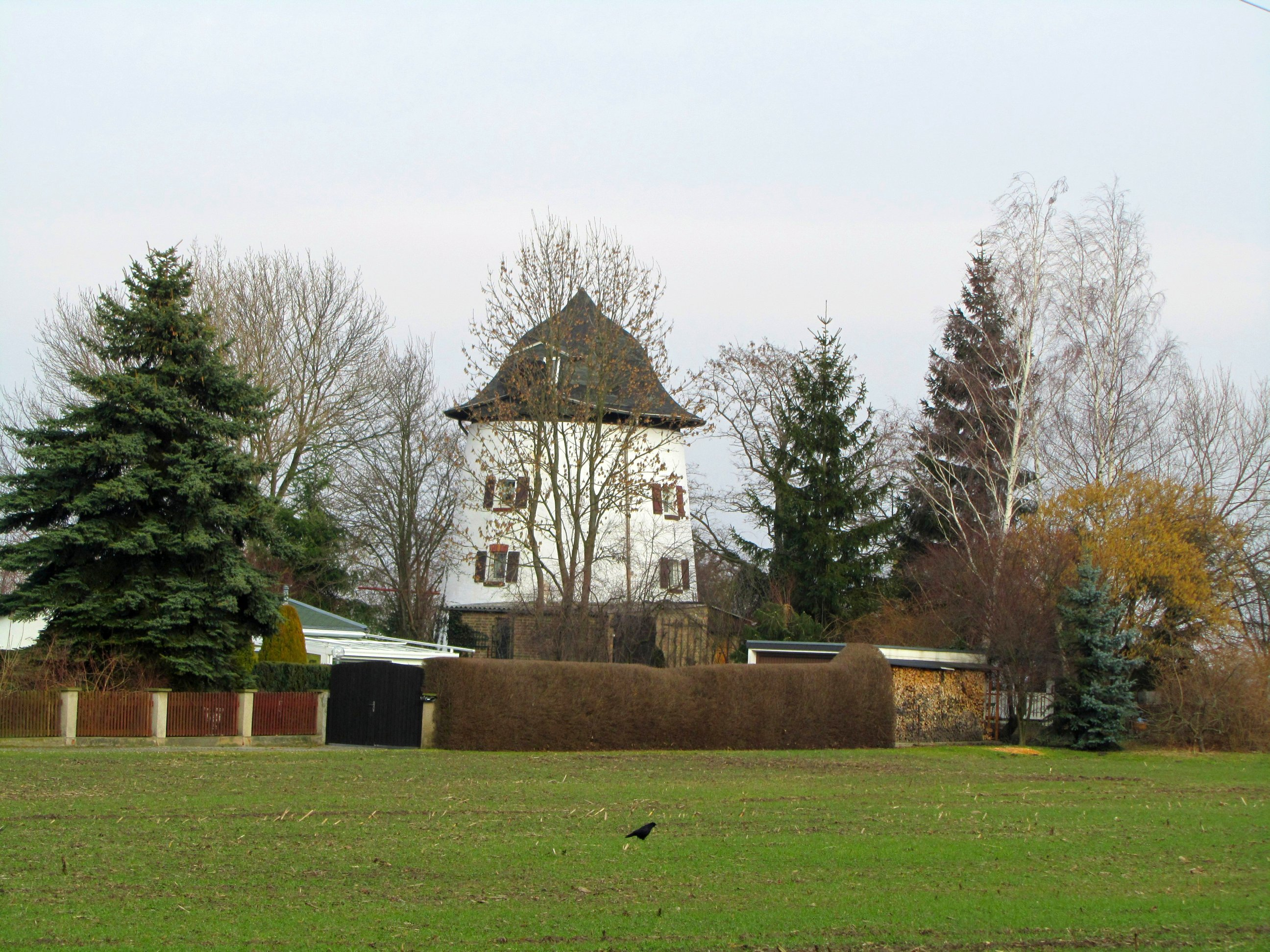 Göhrenz,Windmühle